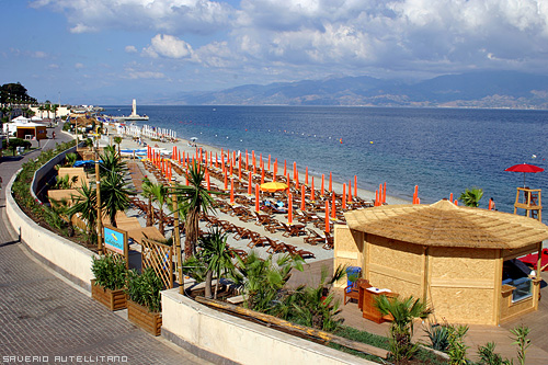 Stabilimenti balneari sulla spiaggia del Lungomare Falcomatà di Reggio Calabria Foto concessa dall'Autore - Saverio Autellitano, - purché se ne citi e se ne riconosca la paternità anche su opere derivate.